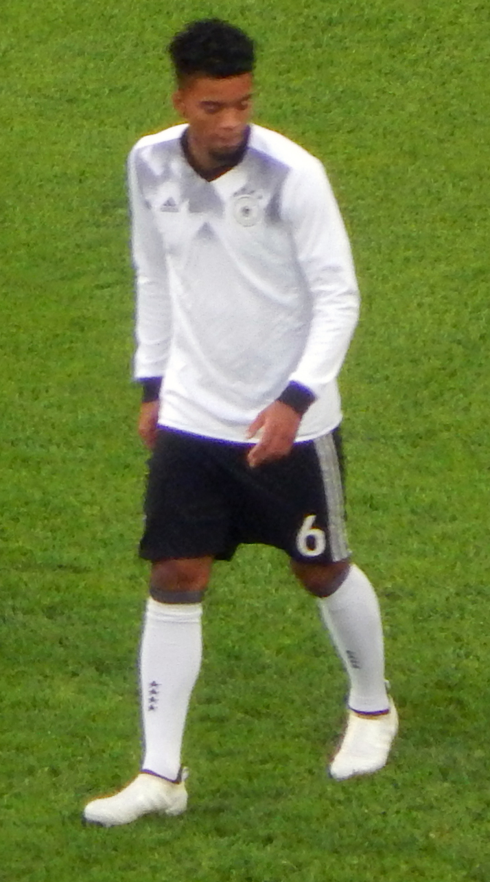 Финал Кубка конфедераций 2017